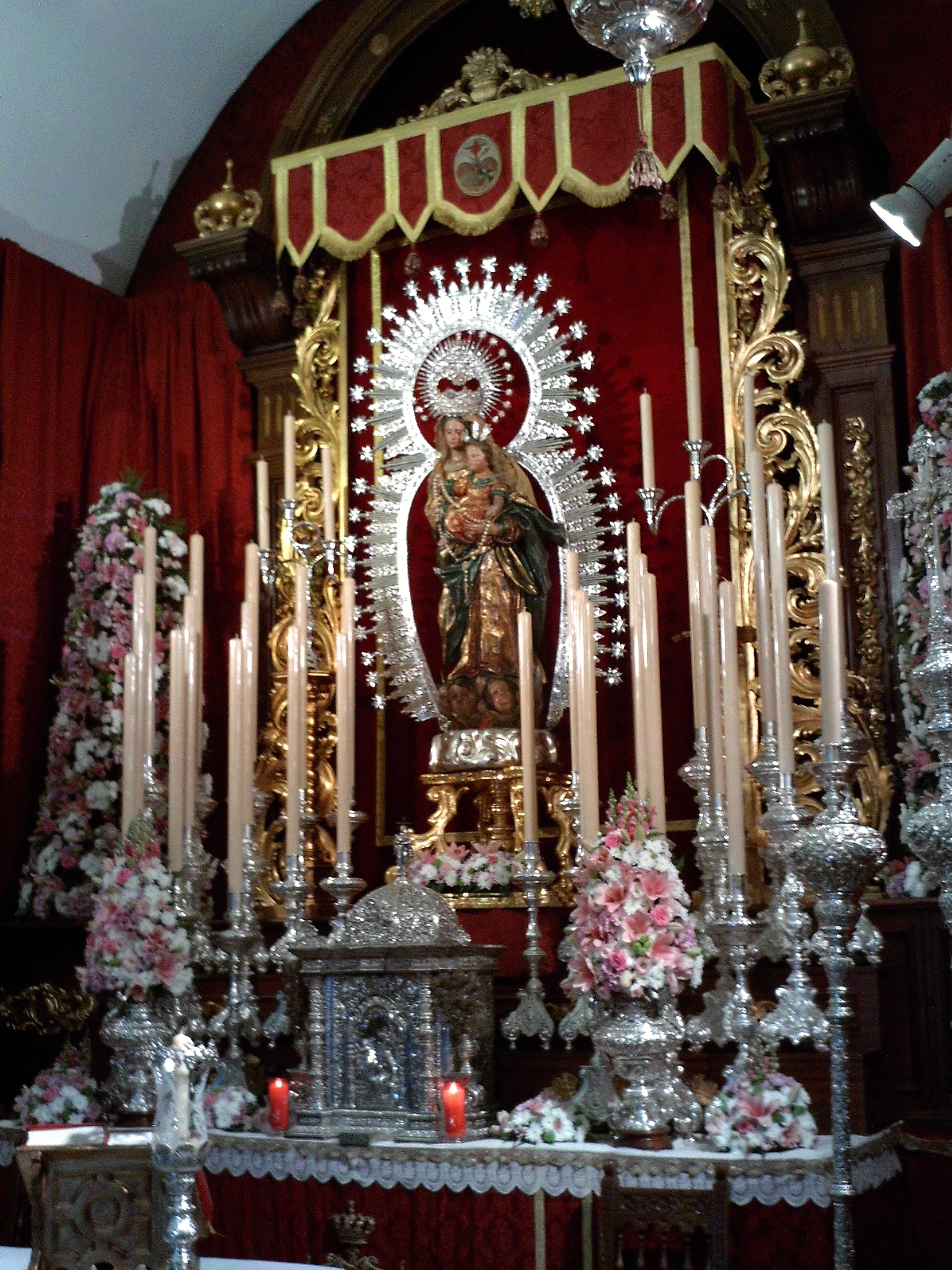 Virgen del Rosario del siglo XVIII en el altar de la capilla de la que es titular. Sevilla, Andalucía, España.